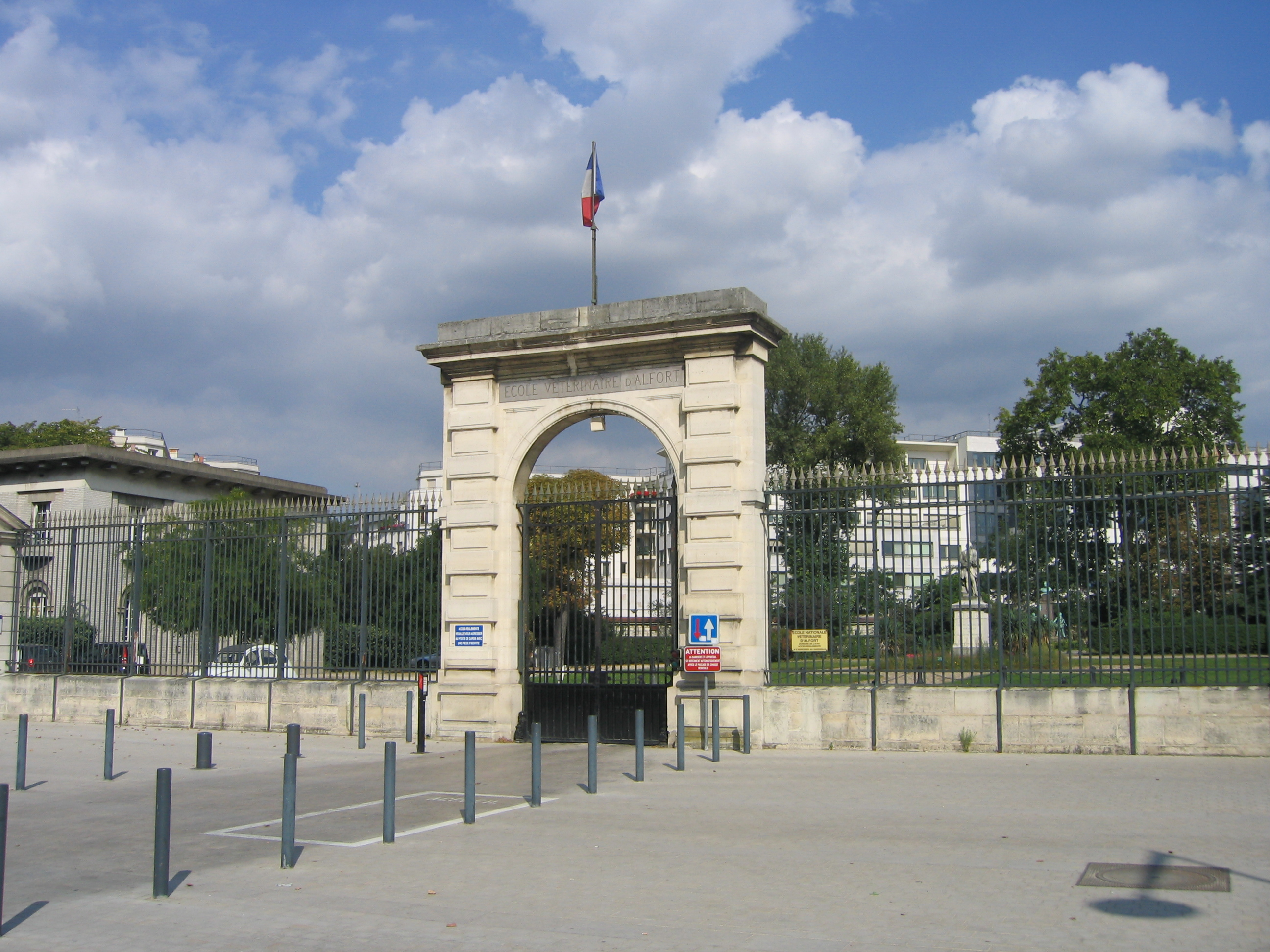 Entrée principale de l'école vétérinaire à Maisons-Alfort dans le Val de Marne en France